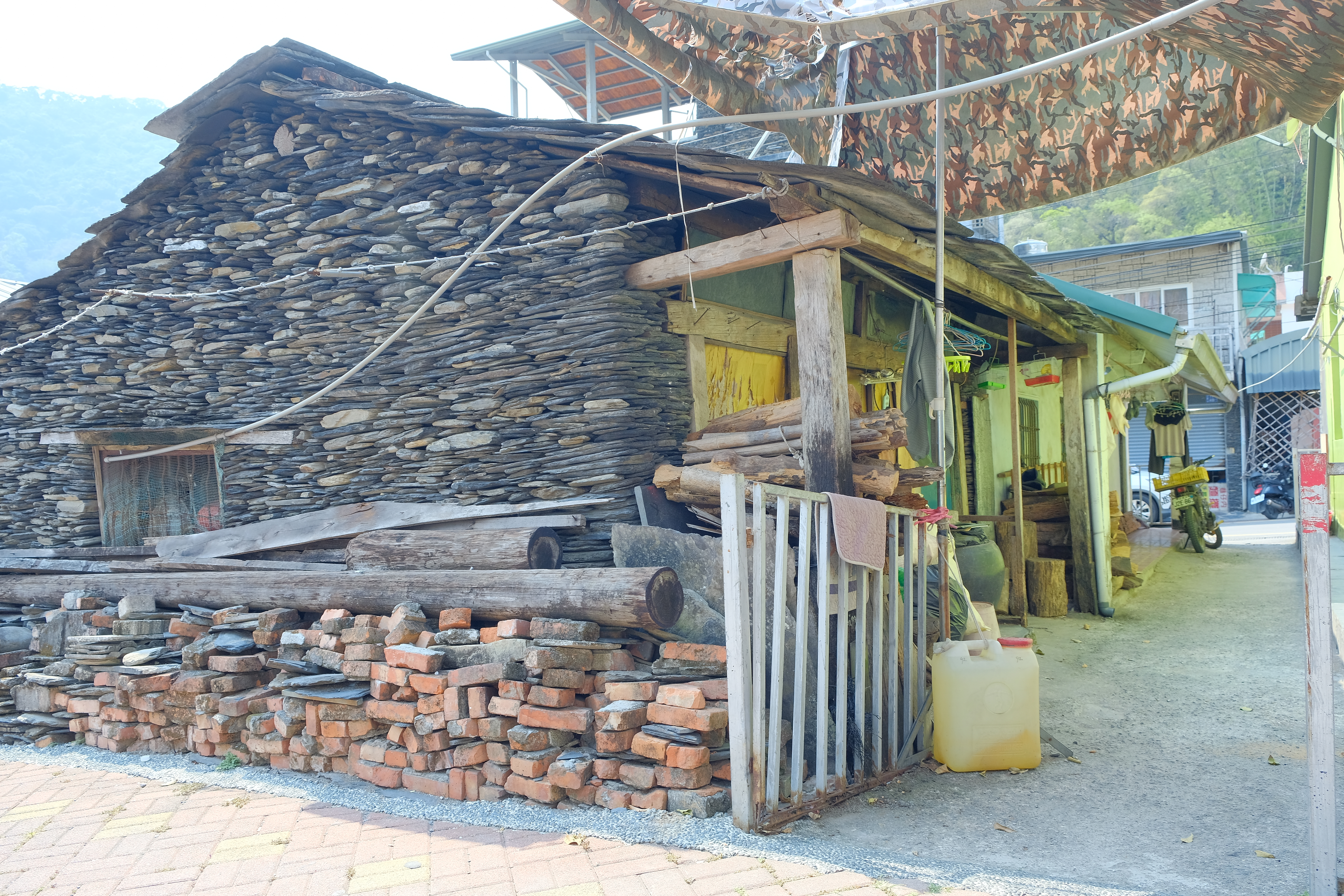 中文（台灣）: 2019 高雄市茂林區多納 石板屋